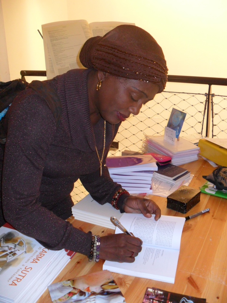 La journaliste et poétesse Maggy De Coster lors d'une vente-signature publique